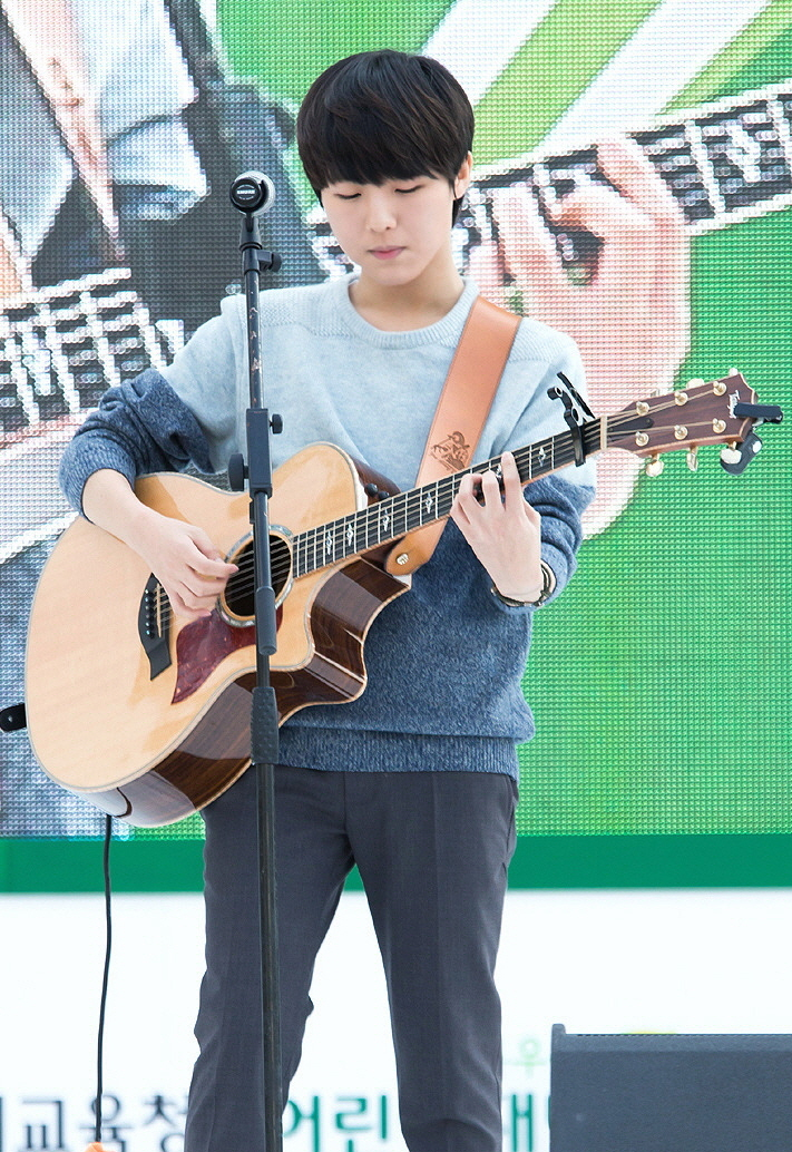 14.10.18 서울시청 유승우